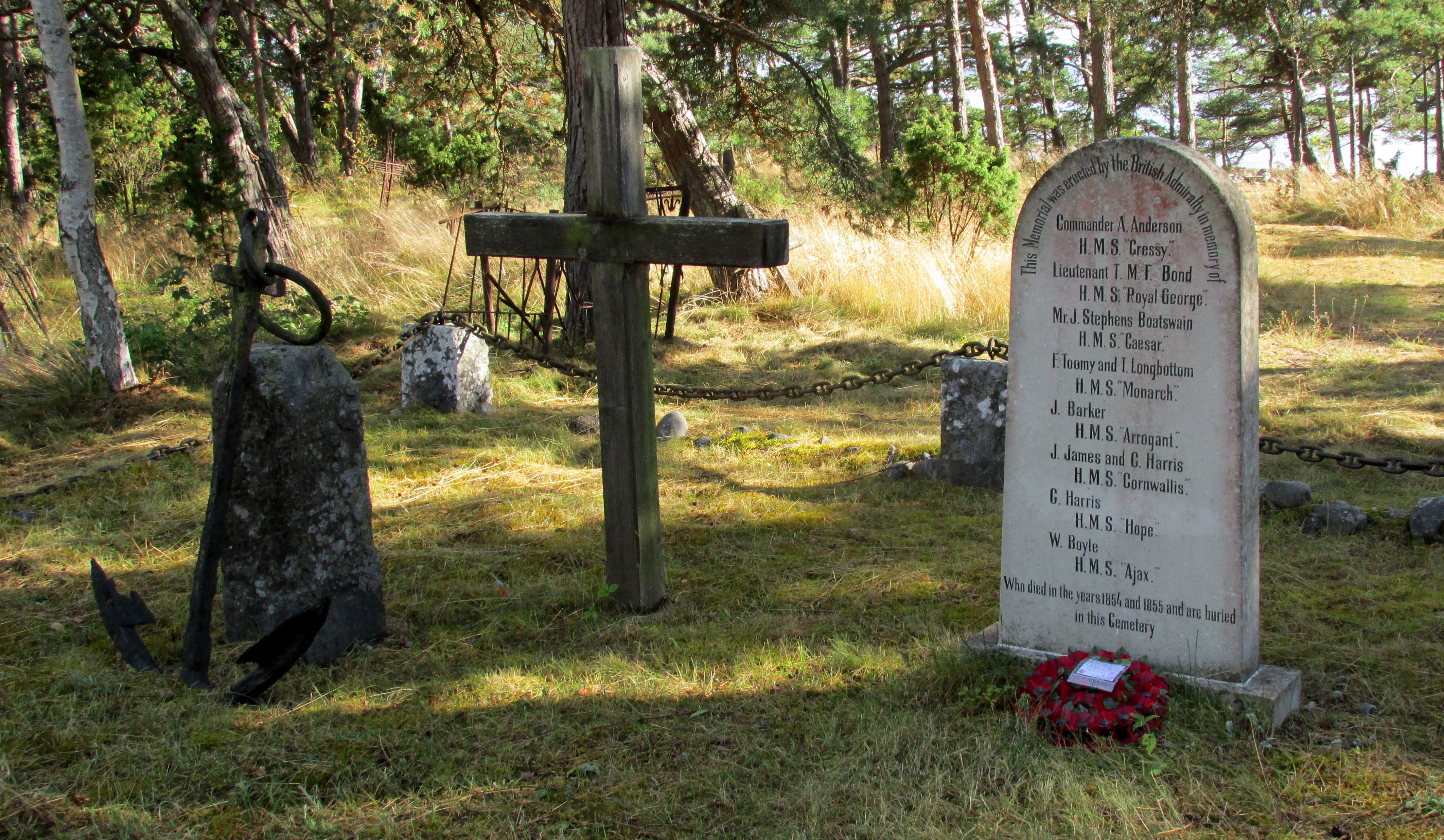 Naissaare kalmistul asuv Krimmi sõja ajal hukkunud Inglise sõduritele pühendatud mälestusmärk